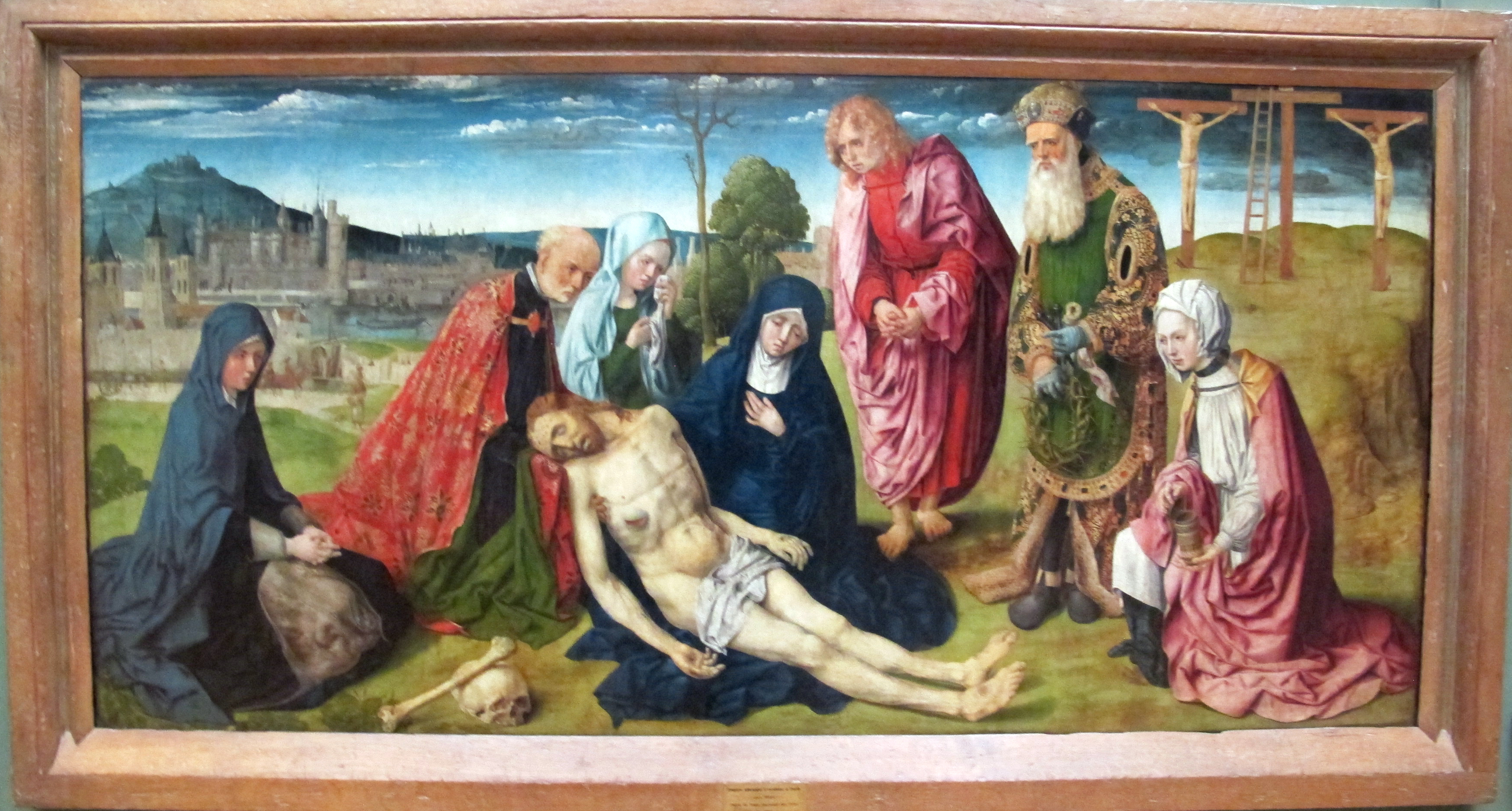 La Vierge Marie tient sur ses genoux le corps de Jésus Christ descendu de la croix. Une vue de Paris, avec le Louvre et l'abbaye de Saint-Germain-des-Prés, remplace l'habituelle évocation de Jérusalem en symétrie du mont Golgotha où Jésus Christ fut crucifié. Guillaume IV Briçonnet, abbé de Saint-Germain (1503- 1507), aurait donné ses traits à l'homme agenouillé derrière le Christ. Numéro d'inventaire : 8561